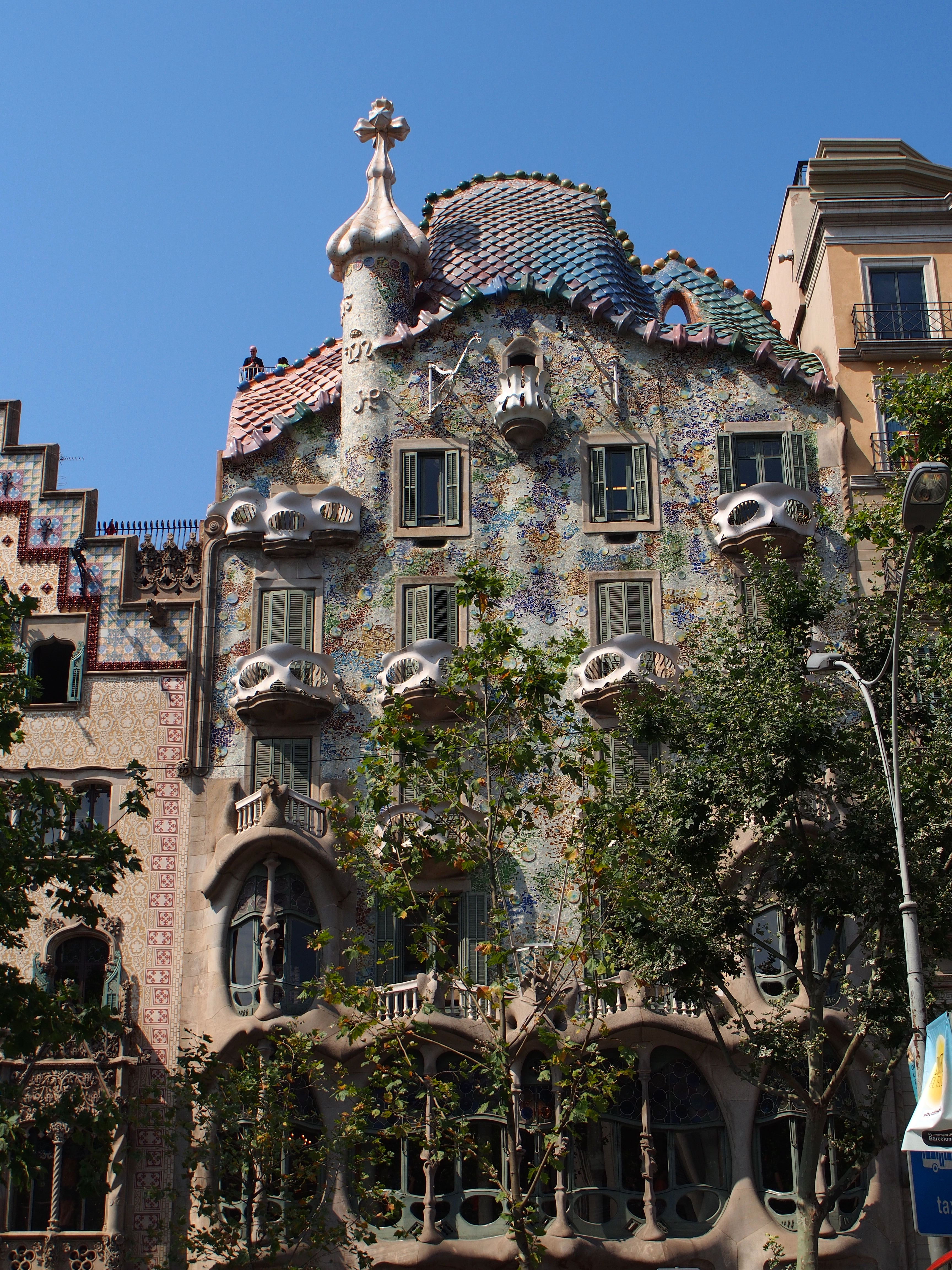 Facade of Casa Batlló - 2013.07